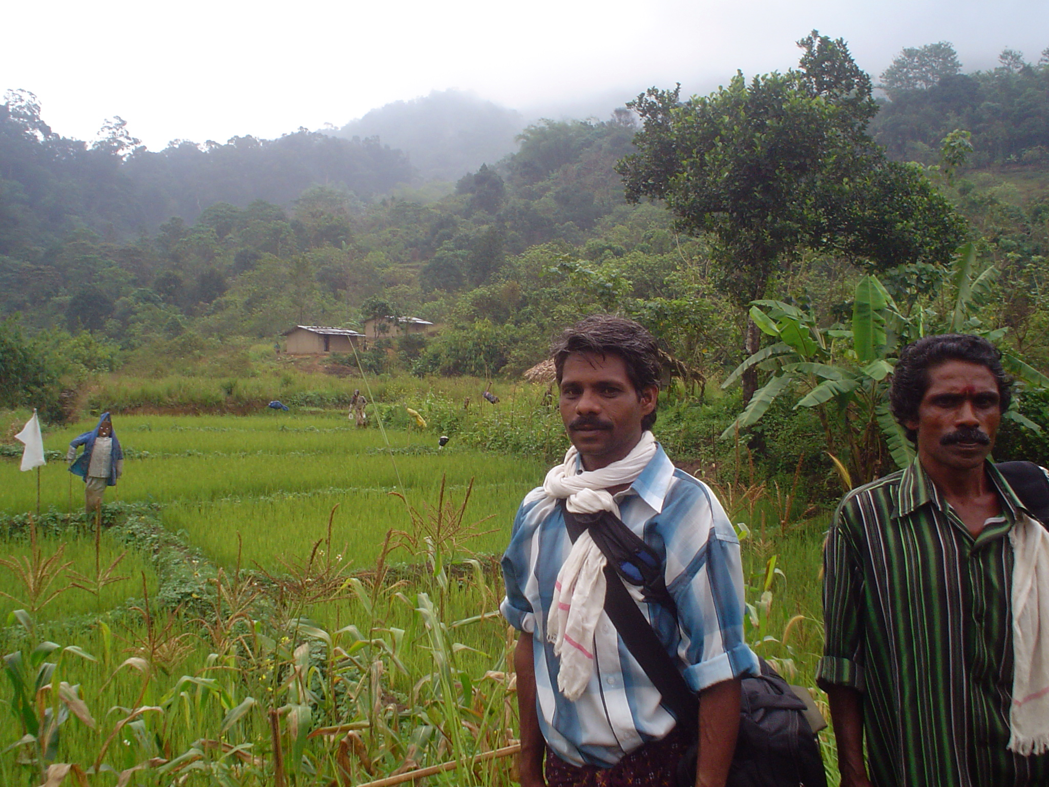 ഇടമലക്കുടി ആദിവാസി ഗ്രാമ പഞ്ചായത്തിലെ സാമൂഹ്യ ആരോഗ്യ സന്നദ്ധ പ്രവർത്തകർ . പട്ടിക വർഗ വികസന വകുപ്പ് ഇവരെ, കൊച്ചി അമൃത മെഡിക്കൽ കോളേജിൽ അയച്ചു പരിശീലിപ്പിച്ചിട്ടൊണ്ട്.‌